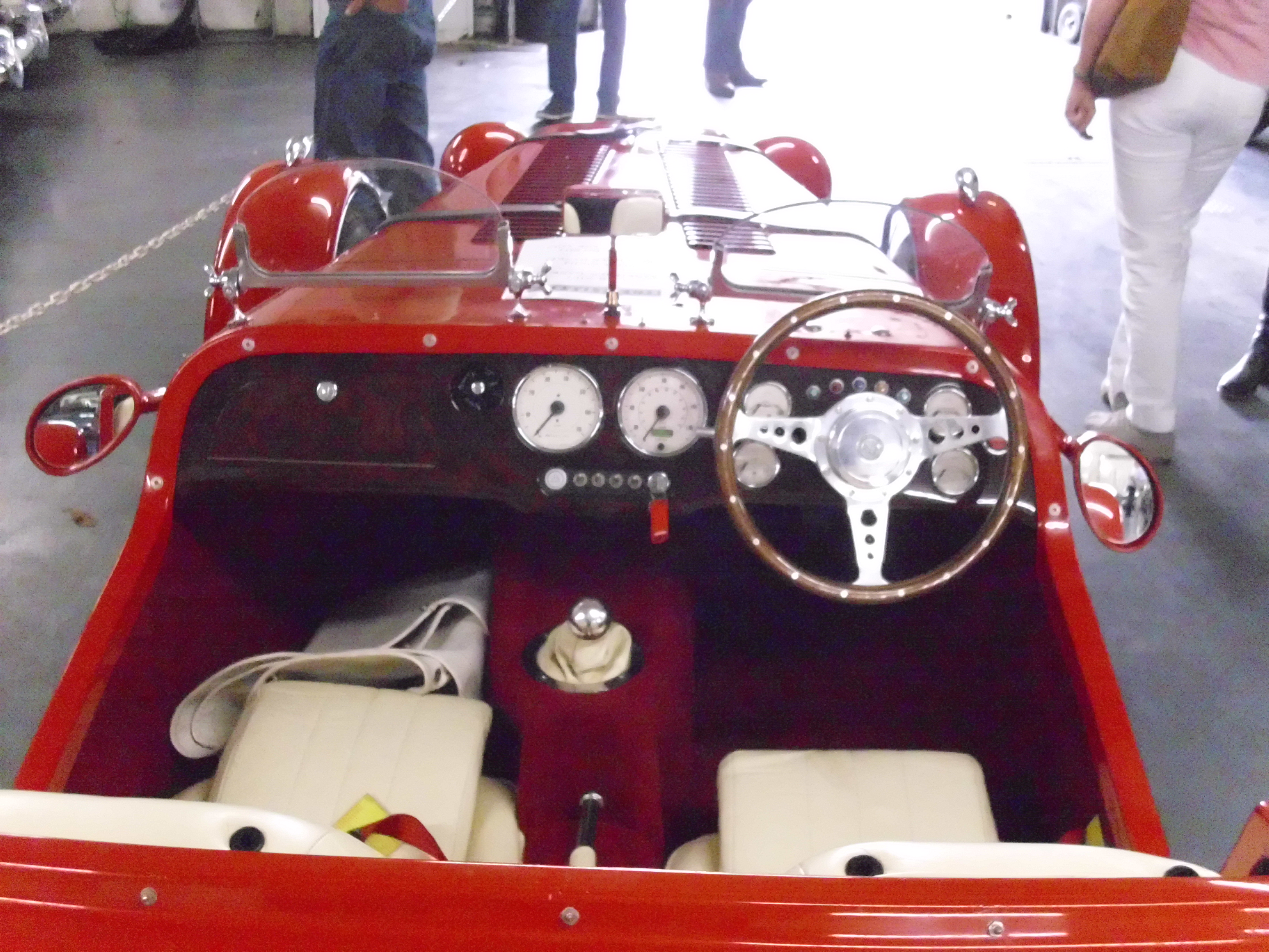 NG 3.5 V8 Special Roadster Interieur